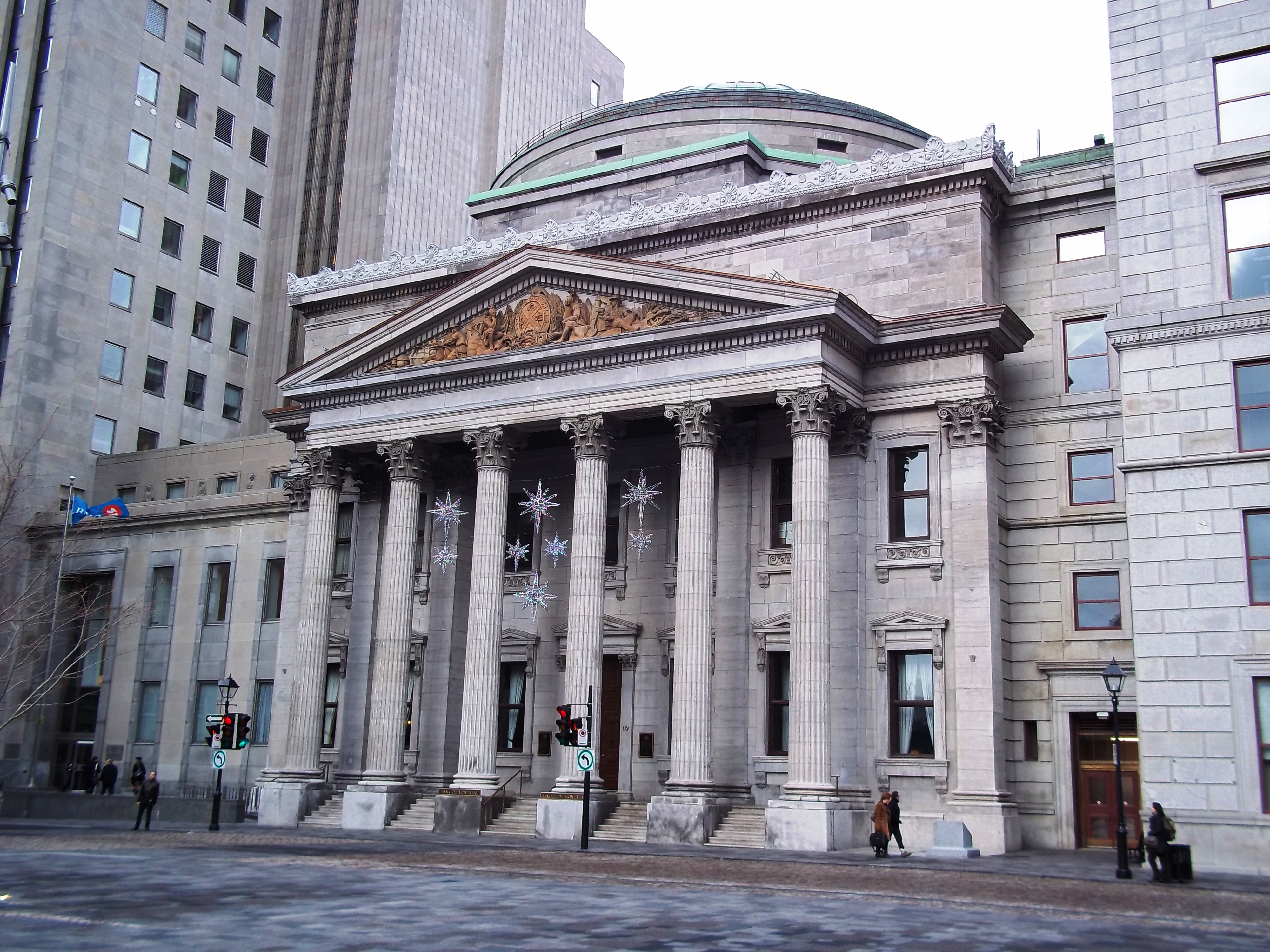 Édifice de la Banque de Montréal, Place d'Armes, Montréal